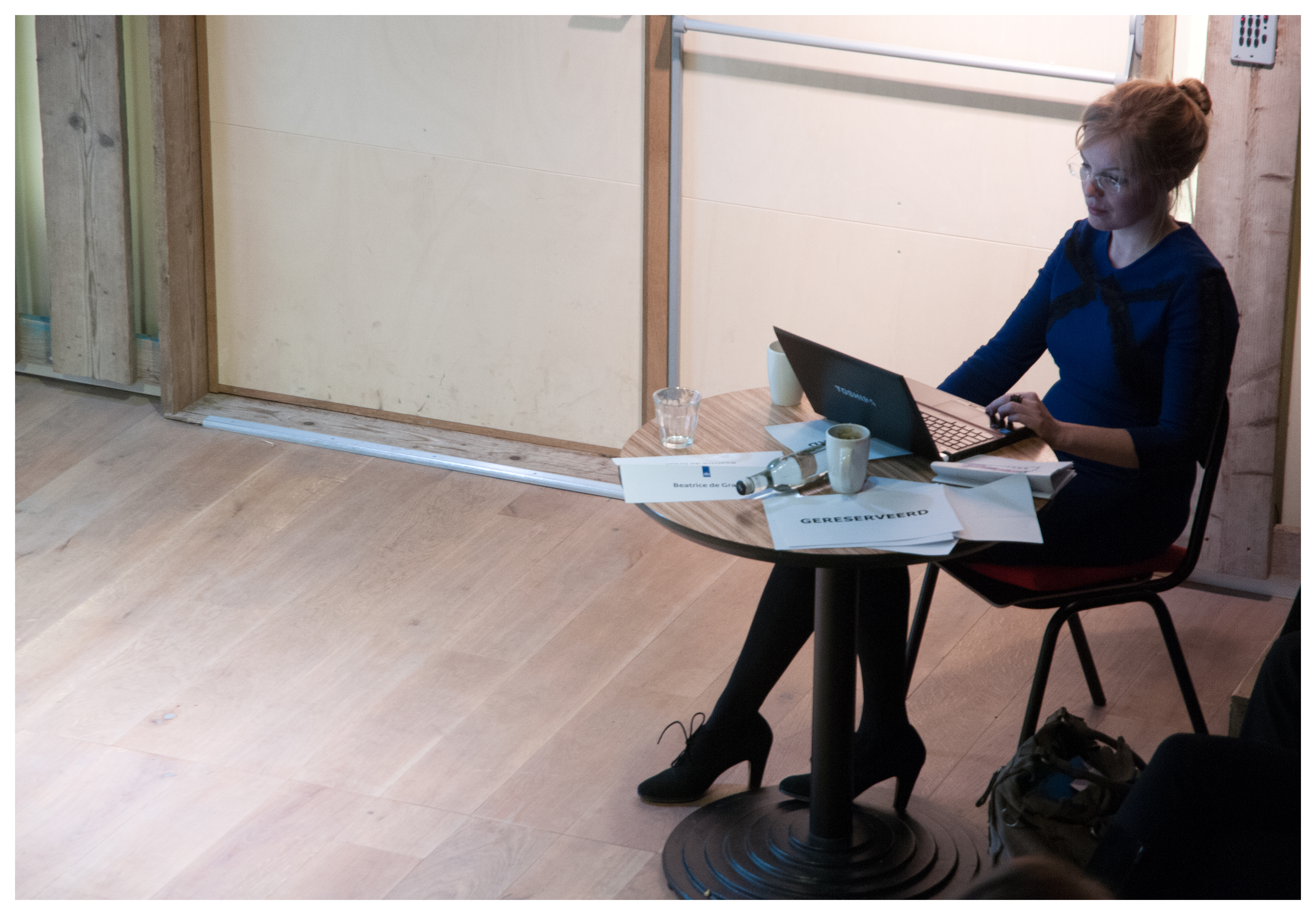 Beatrice de Graaf maakt aantekeningen tijdens de bijeenkomst. Zij vat aan 't eind de bevindingen samen